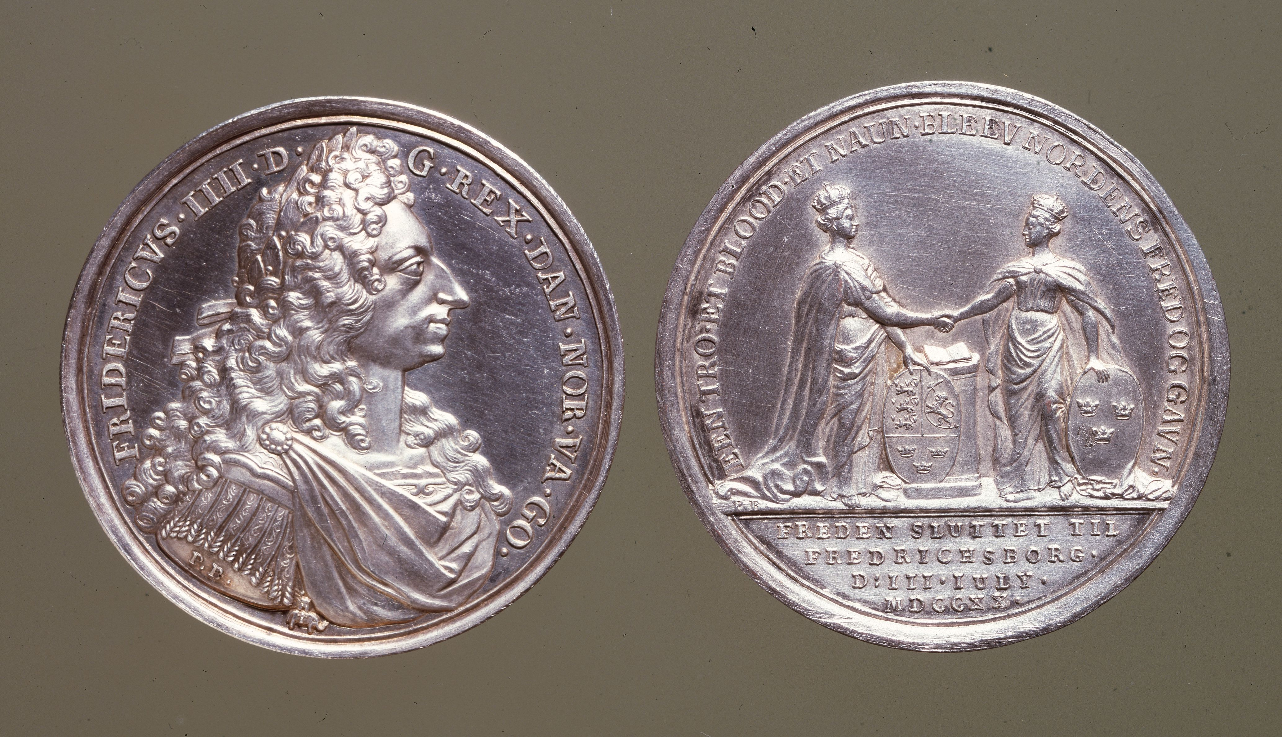 Christian Wineke: Frederik IV, Fredsslutningen på Frederiksborg 3. juli 1720. Forsiden bærer kongens portræt og titel "FRIDERICVS IIII D. G. REX DAN. NOR. VA. GO." og på bagsiden personificeringerne af rigerne Danmark og Sverige i form af to kronede kvinder, som bærende hvert sit våbenskjold trykker hinanden i hånden under omskriften "EEN TRO EET BLOD ET NAUN BLEEV NORDENS FRED OG GAVN" og nederst indskriften "FREDEN SLUTTET TIL FREDRICHSBORG D III IULI MDCCXX".